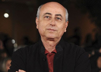 Primo piano di Roberto Faenza